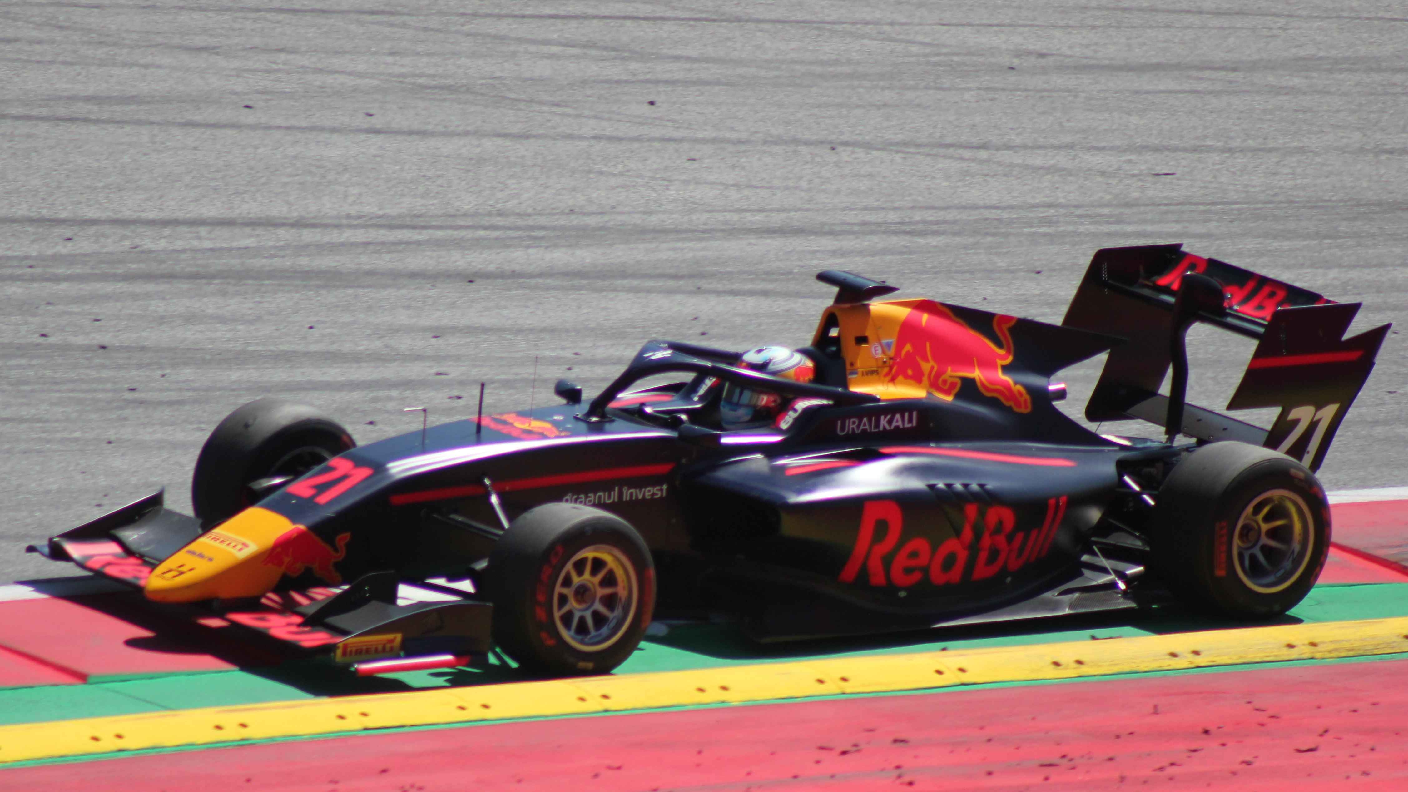 Vips beim Rennwochenende in Österreich 2019